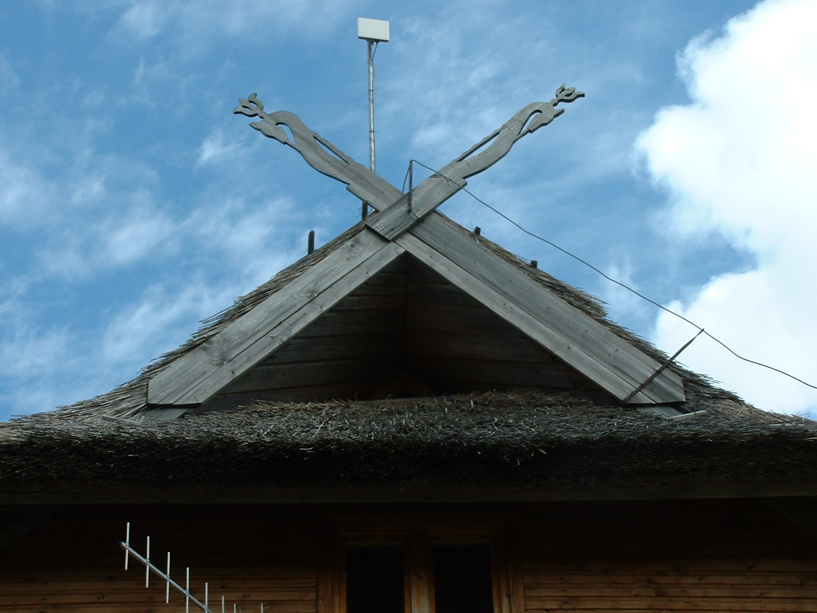 BFWA-Antenne 13 Meter über dem Boden – die Gegenstelle ist ein 26 km entfernter Fernsehturm – in Betrieb seit 2004 (in Litauen) A BFWA CPE of a 26 km connection mounted 13 meters above the ground (2004, Lithuania).